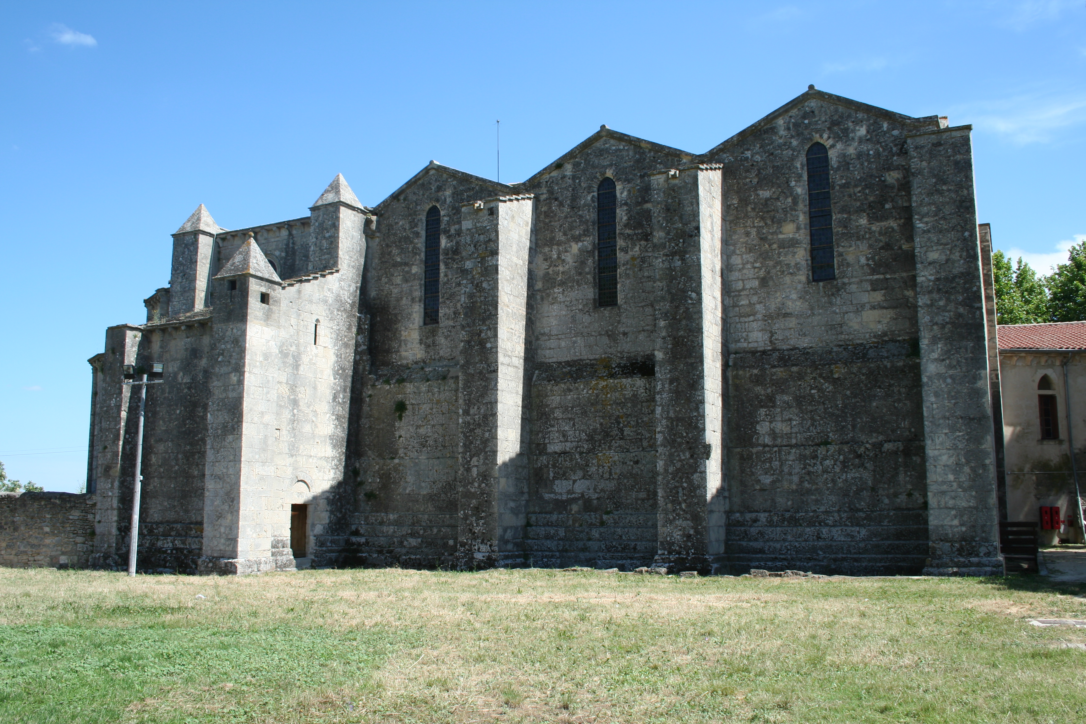 Pignan (Hérault) - façade nord de l'église de l'abbaye du Vignogoul.